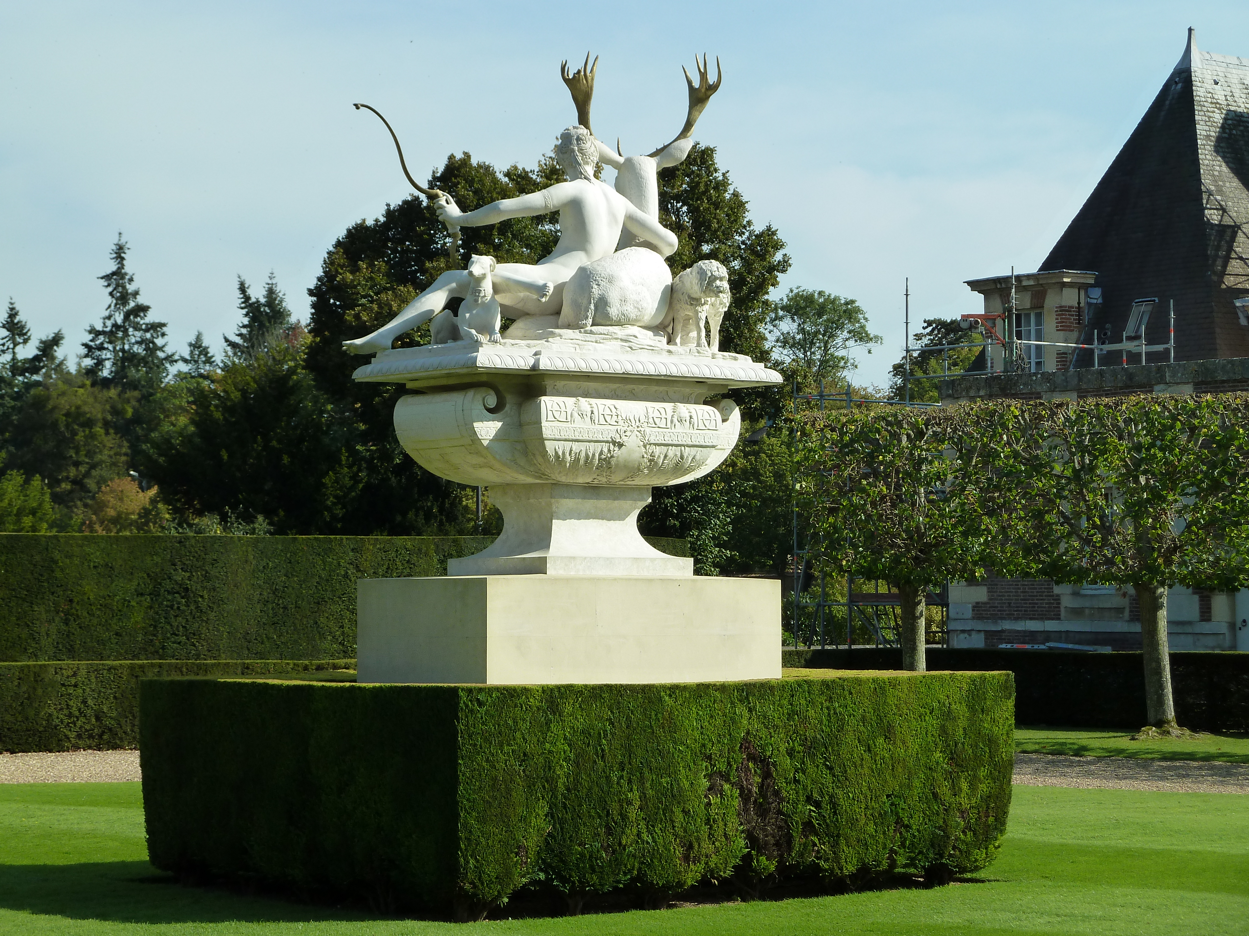 Château d'Anet - Anet - Eure-et-Loir - France - Mérimée PA00096955 .